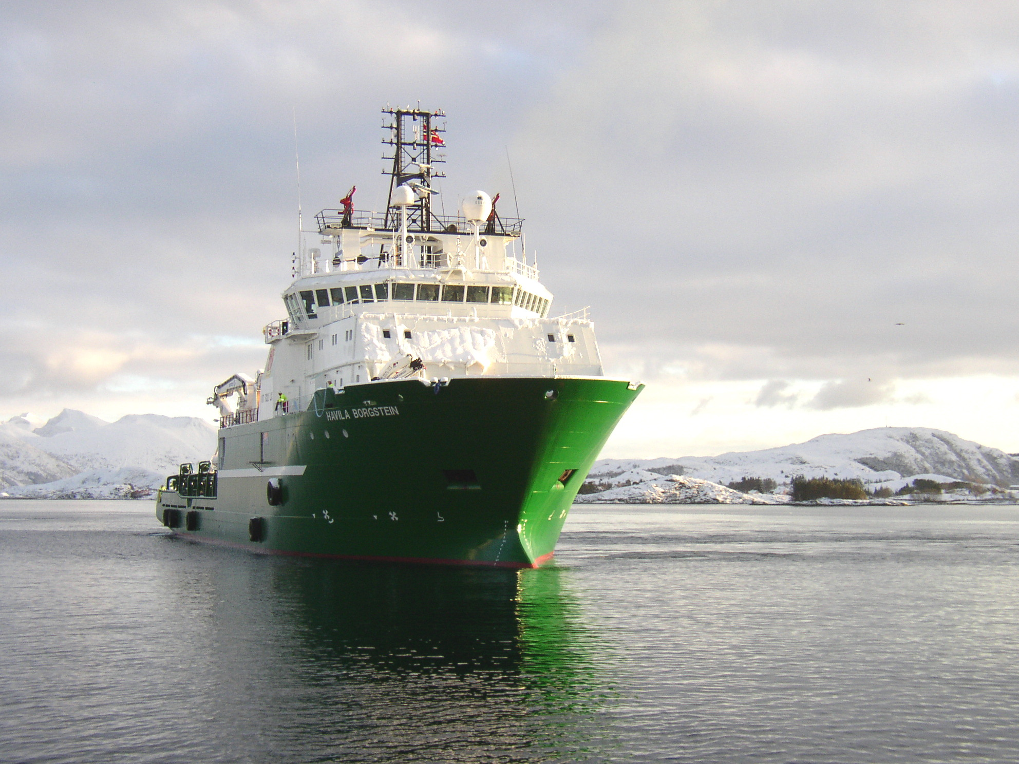 Havila Borgstein IMO number 9272436